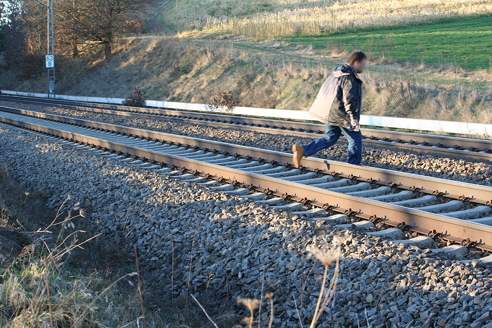 Ein Lokfotograf betritt verbotenerweise eine Bahnanlage